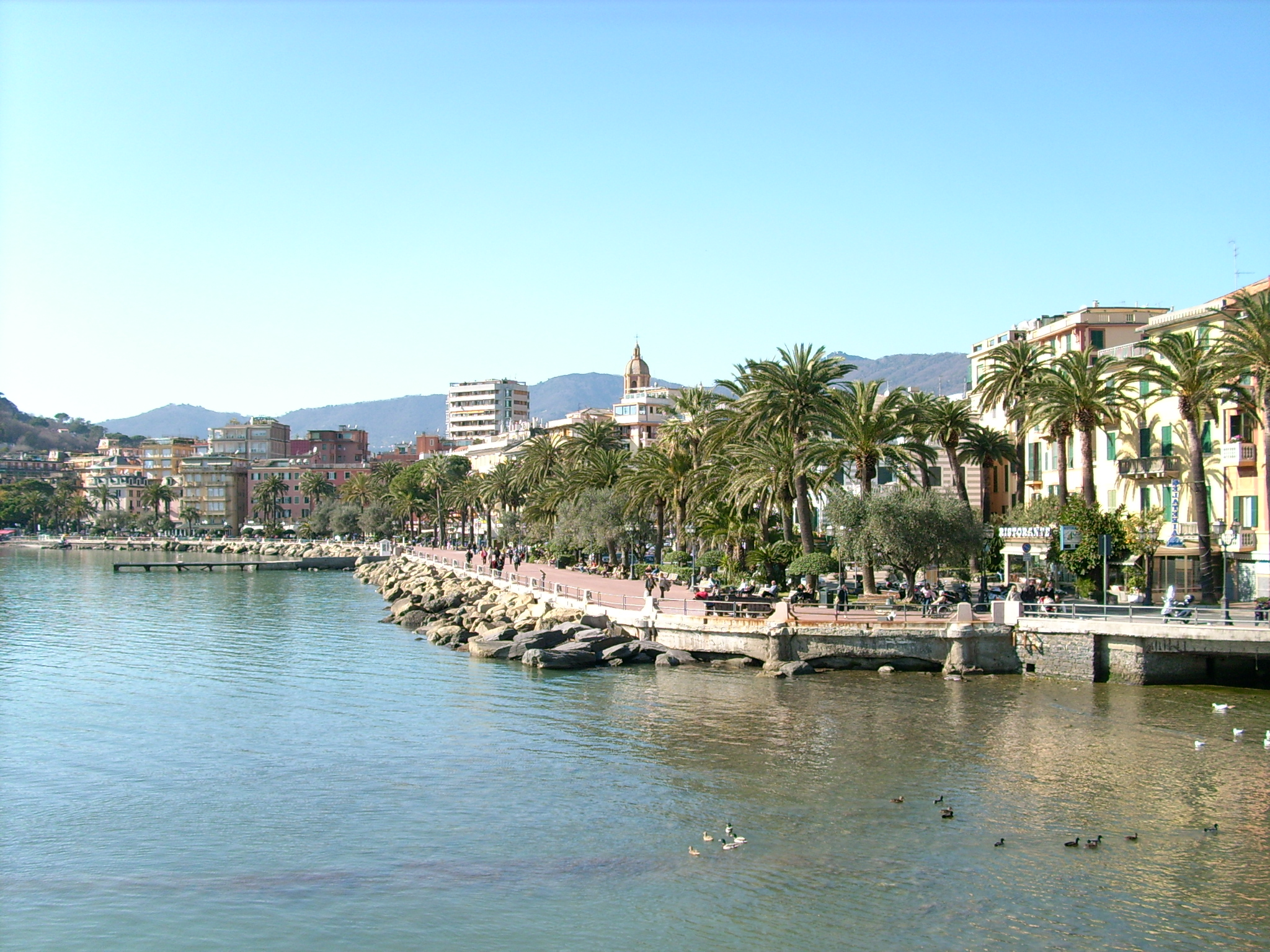 Lungomare Vittorio Veneto di Rapallo